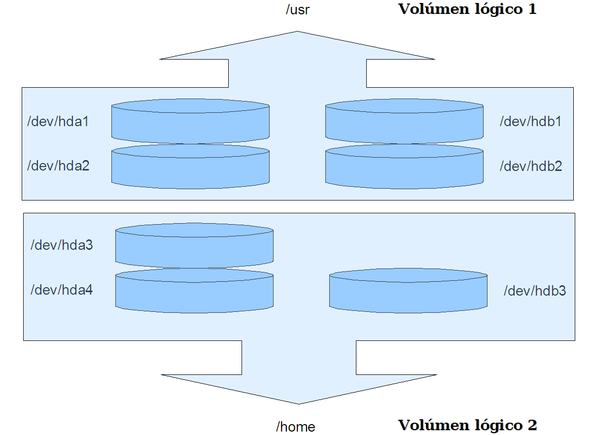 Esquema básico del funcionamiento de LVM